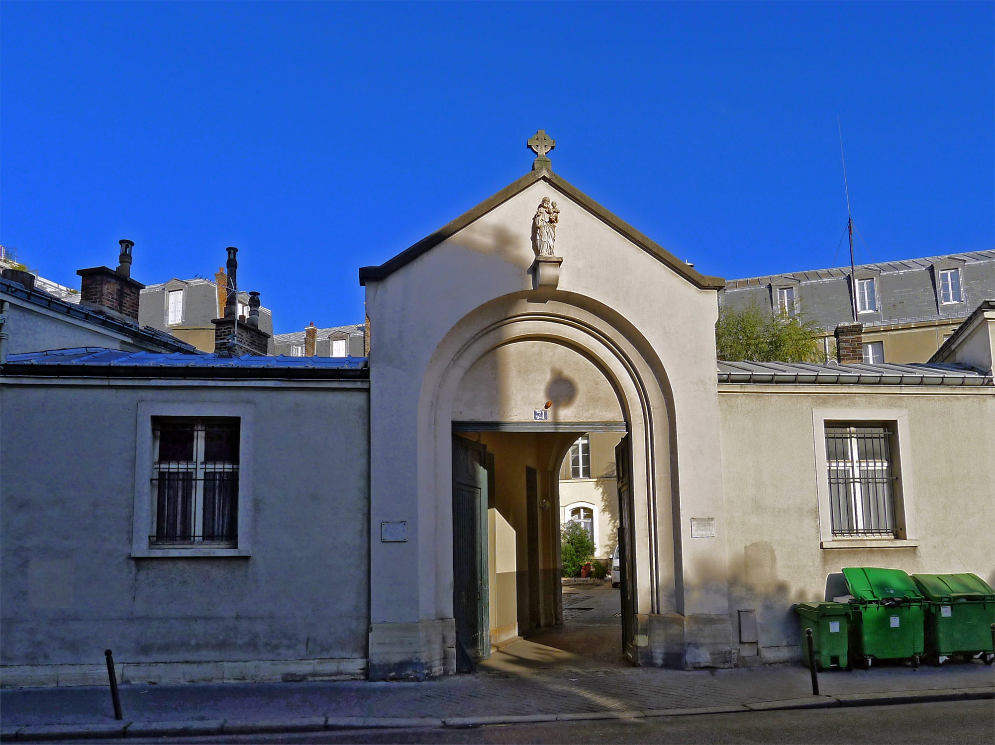 Rue de Picpus (n°71 : maison des Petites-Soeurs-des-pauvres) - Paris XII